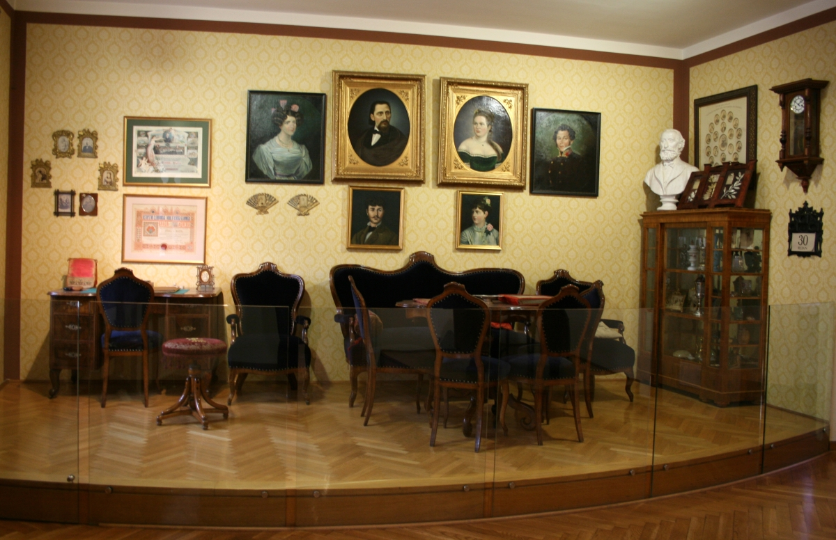 Radna soba Ivana pl. Zajca u Muzeju grada Zagreba.